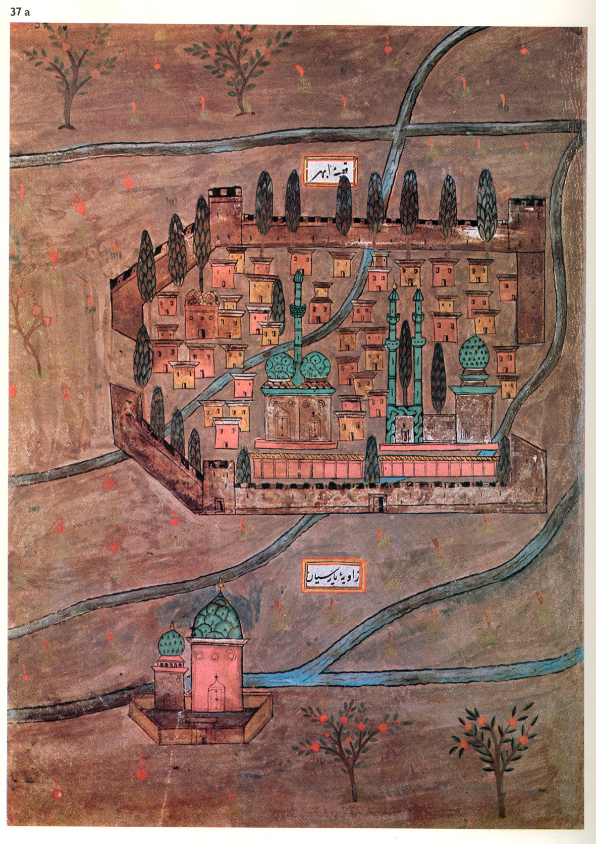 قصبه ابهر/ زاویه پارسیان